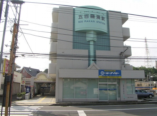 Gohyakurakan Station, on the Izuhakone Daiyūzan Line, Odawara, Kanagawa 五百羅漢駅